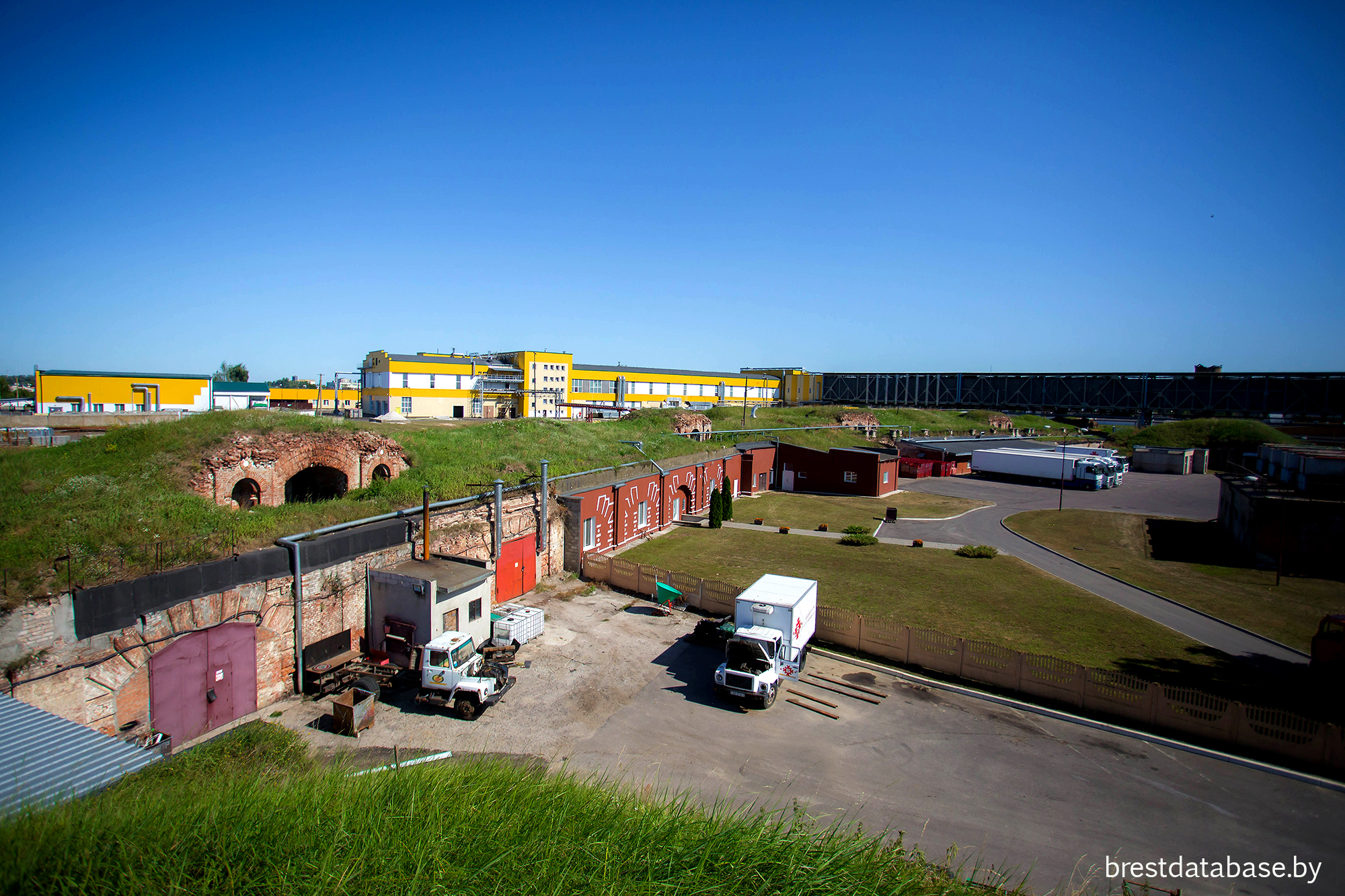 Форт "Граф Берг". Современный вид на вал и казематы